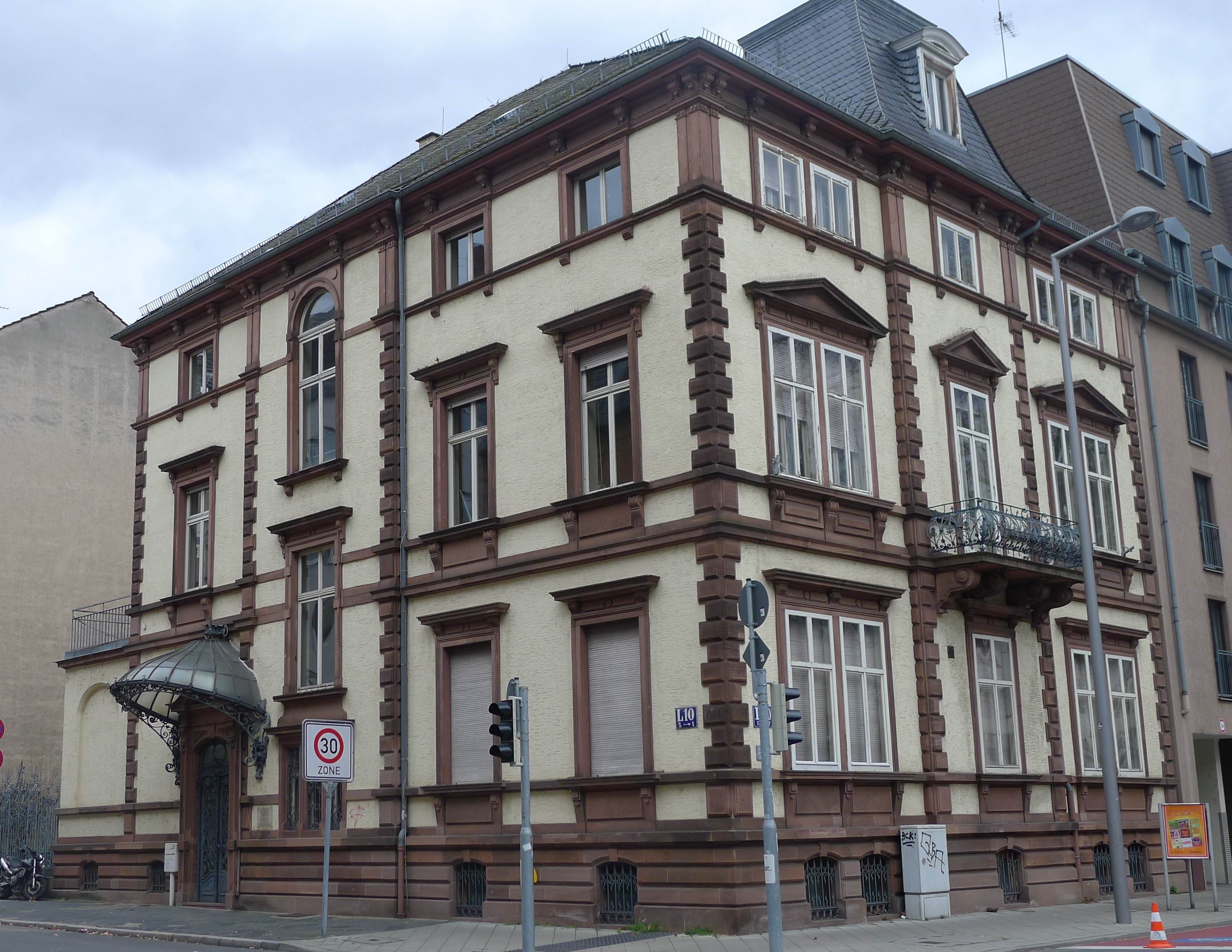 Villa des Ehepaars Felix und Helene Hecht in Mannheim